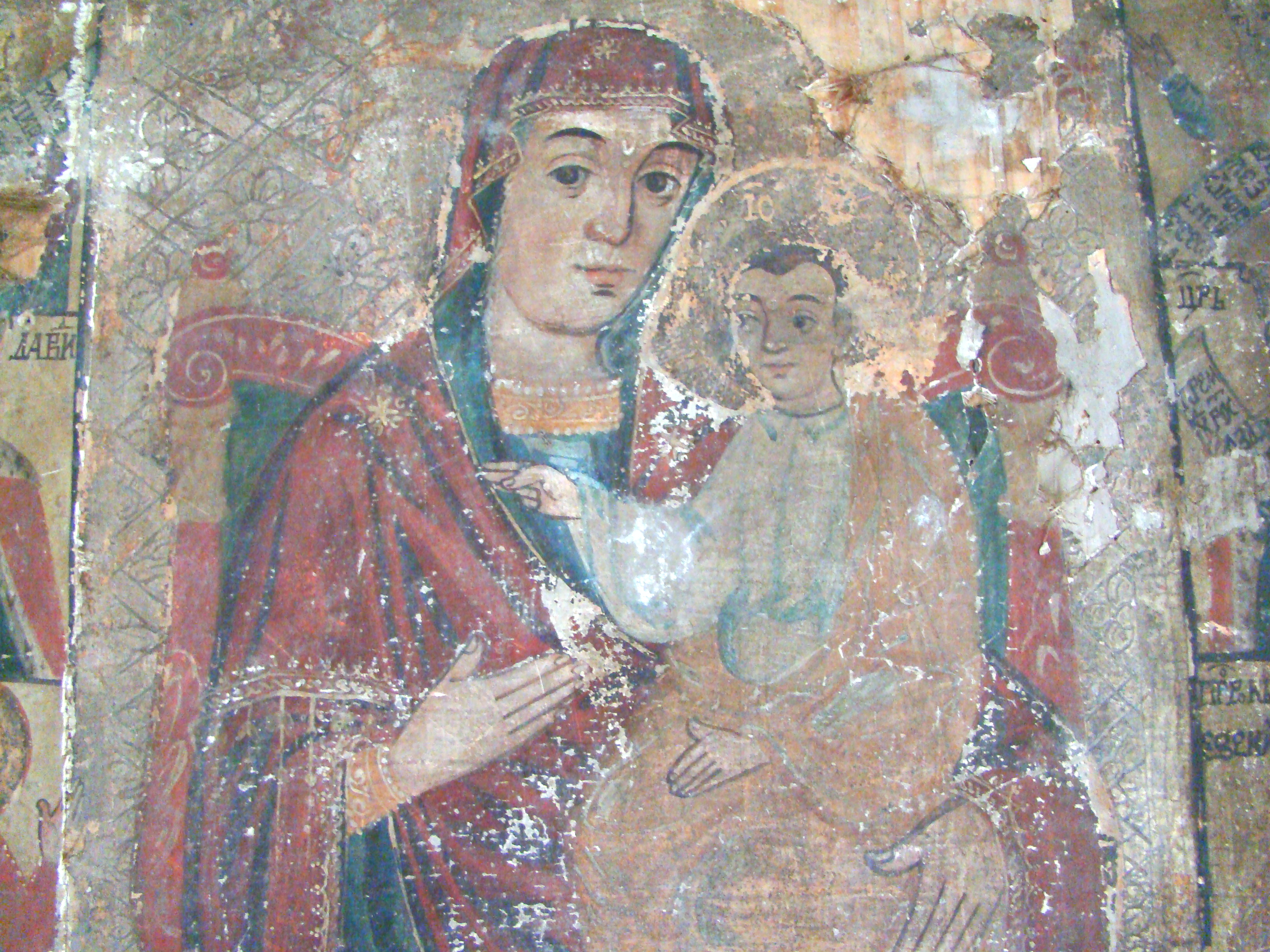 Biserica de lemn „Sf.Arhangheli” din Boiereni, județul Maramureș